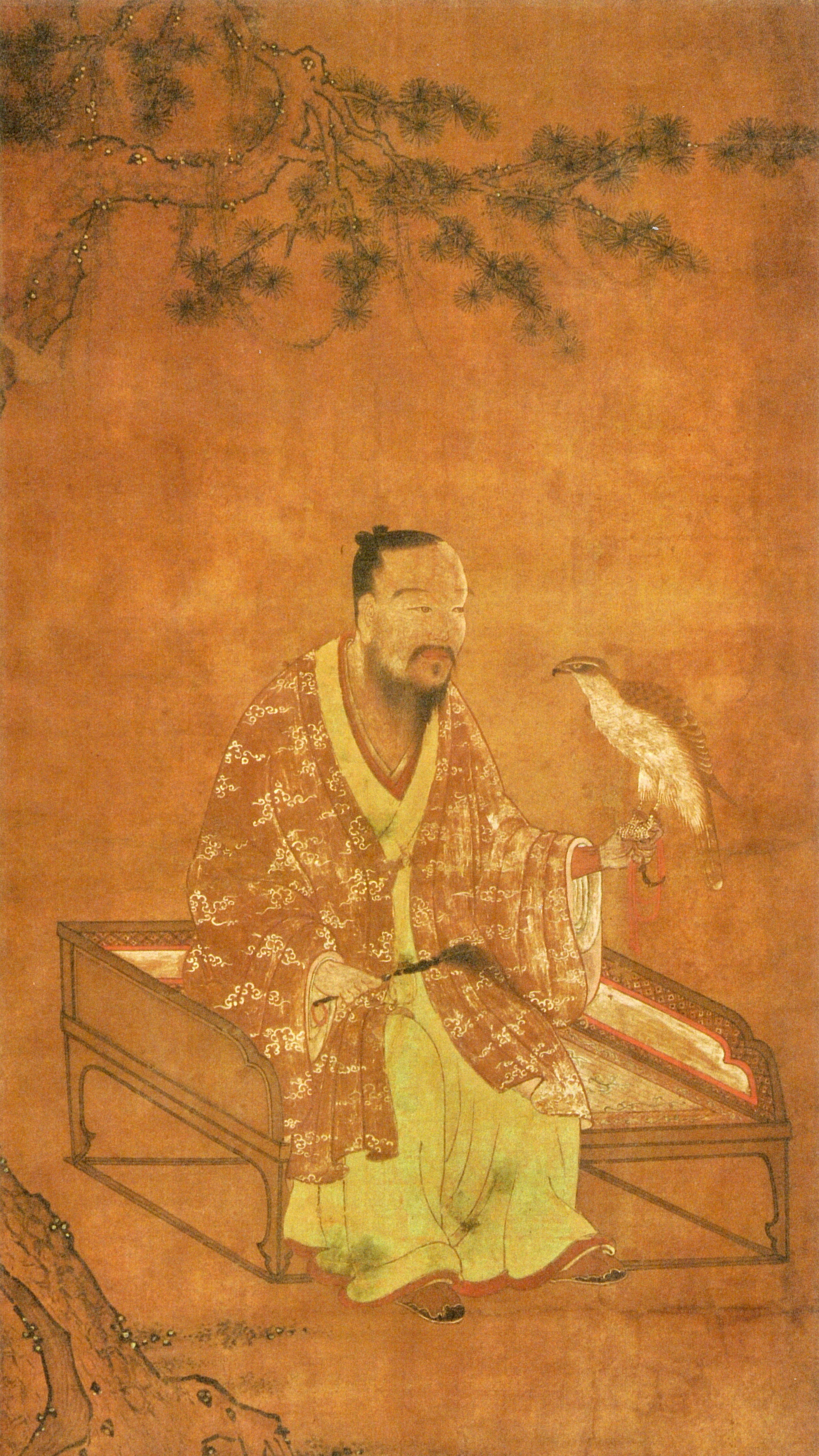 小田氏8代当主・小田治久と伝わる肖像画。